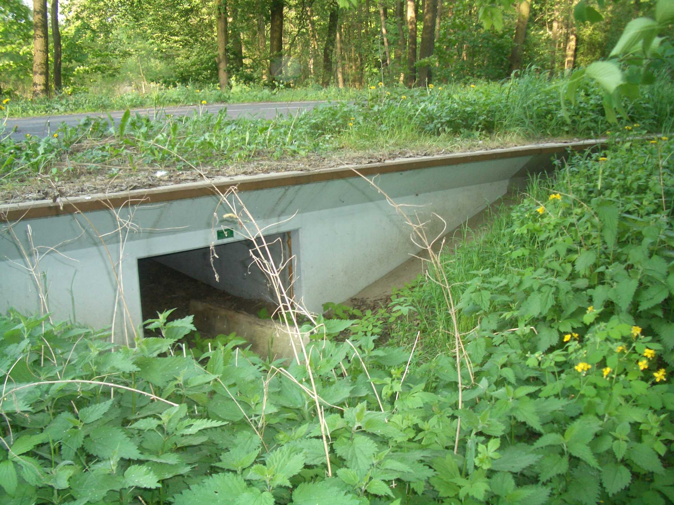 Amphibientunnel bei Berlin-Buch, Deutschland